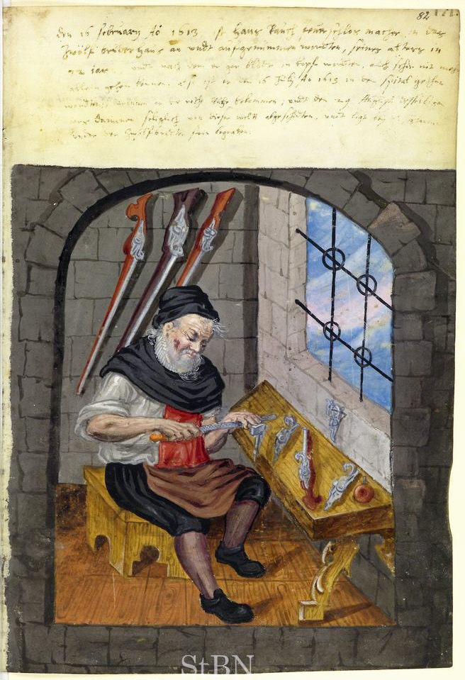 Transkription und weitere Informationen Hans Rauch, feuerschlosmacher (Feuerschlossmacher; Büchsenmacher)